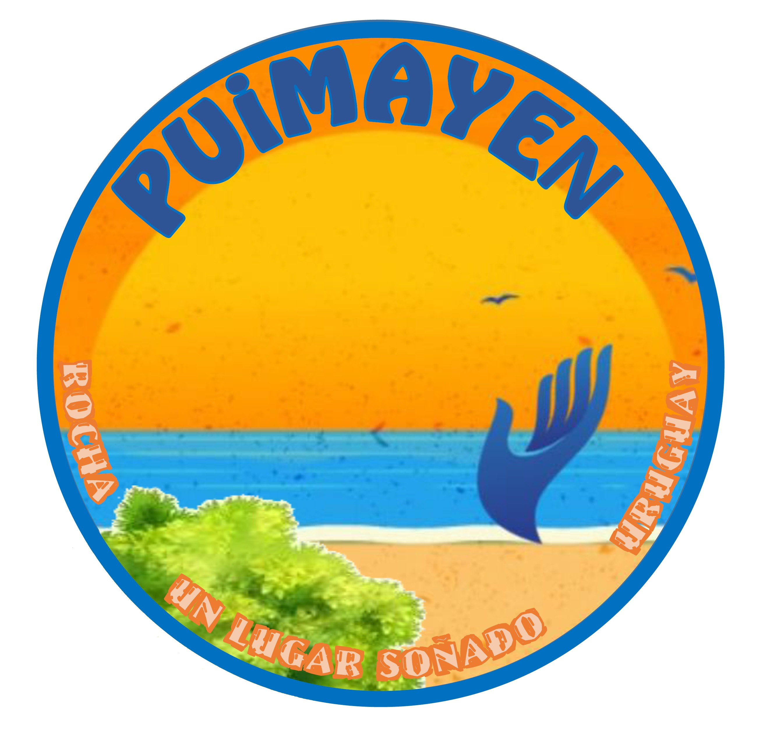 Diseñado en base a un atardecer en el mar, de los mas soñados de la costa este del Uruguay, acompañado por su vegetación autóctona (la Acacia Negra) y la escultura "La Mano"